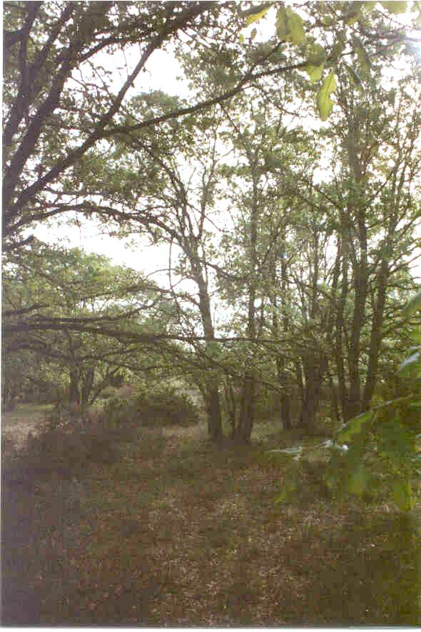 Quejigos, foto propia, realizada en Torrecuadrada de los Valles, (Guadalajara).